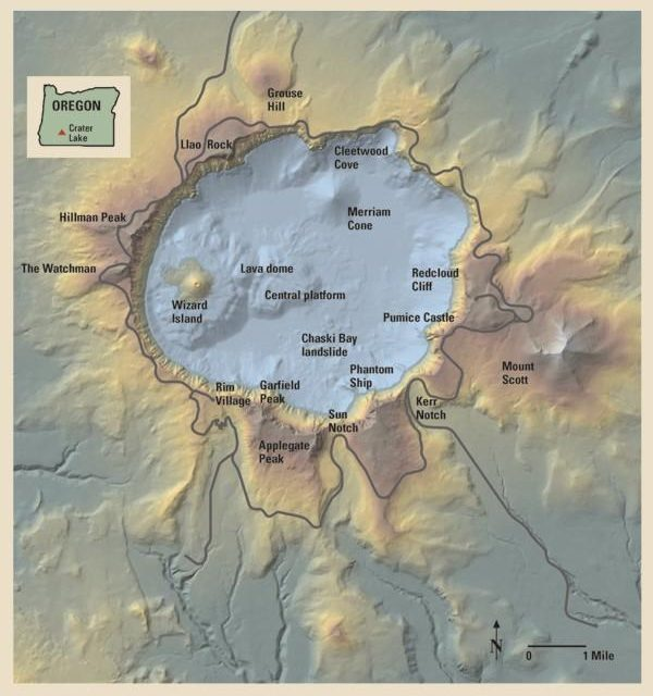 Mapa en relieve del Parque Nacional Lago del Cráter